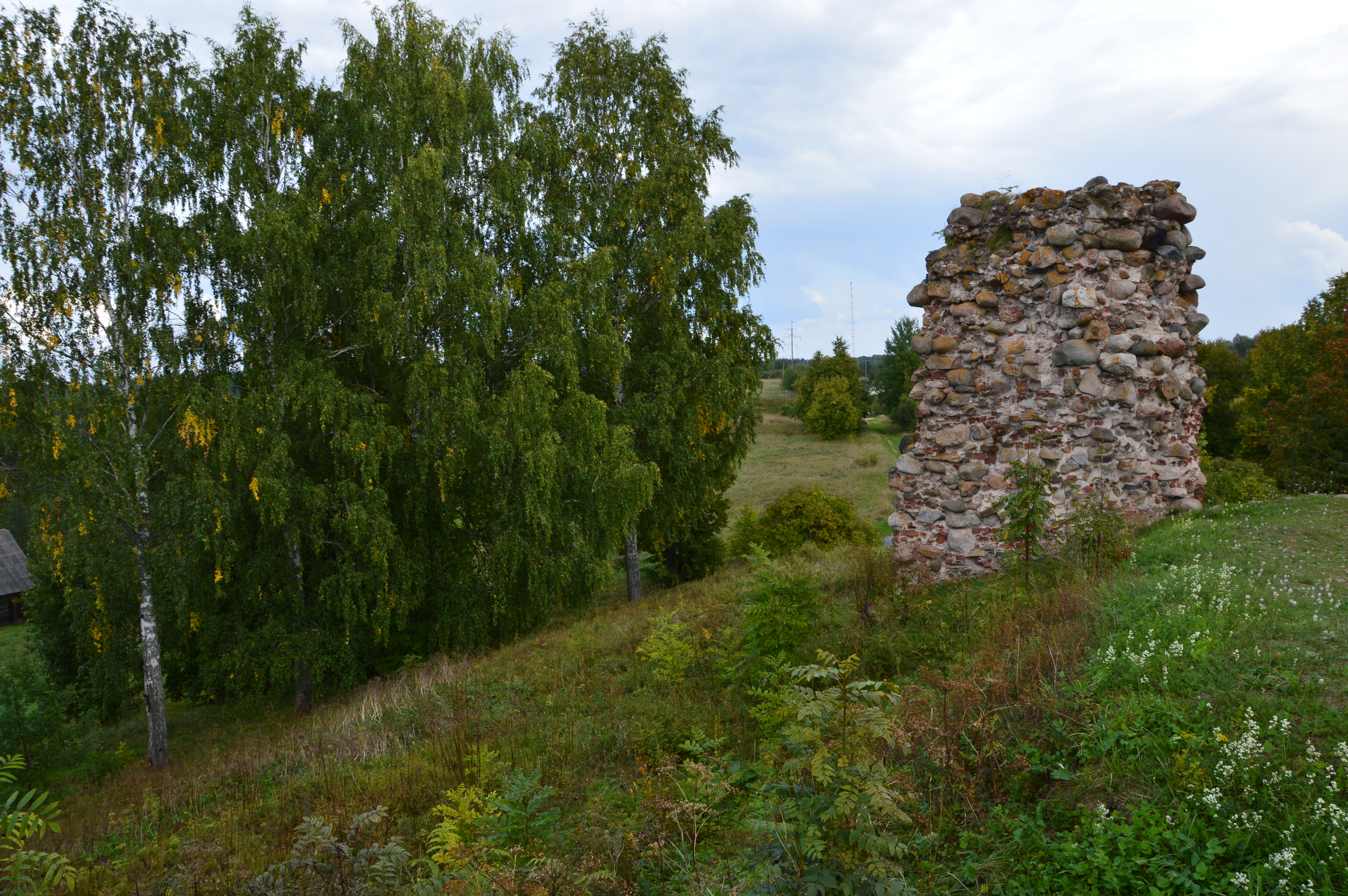 Kirumpää linnus